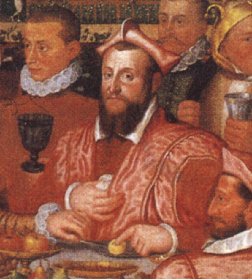 Anthony Bays: Hohenemser Festtafel, 1578, Detail: Kardinal Markus Sittikus von Hohenems, Bischof von Konstanz